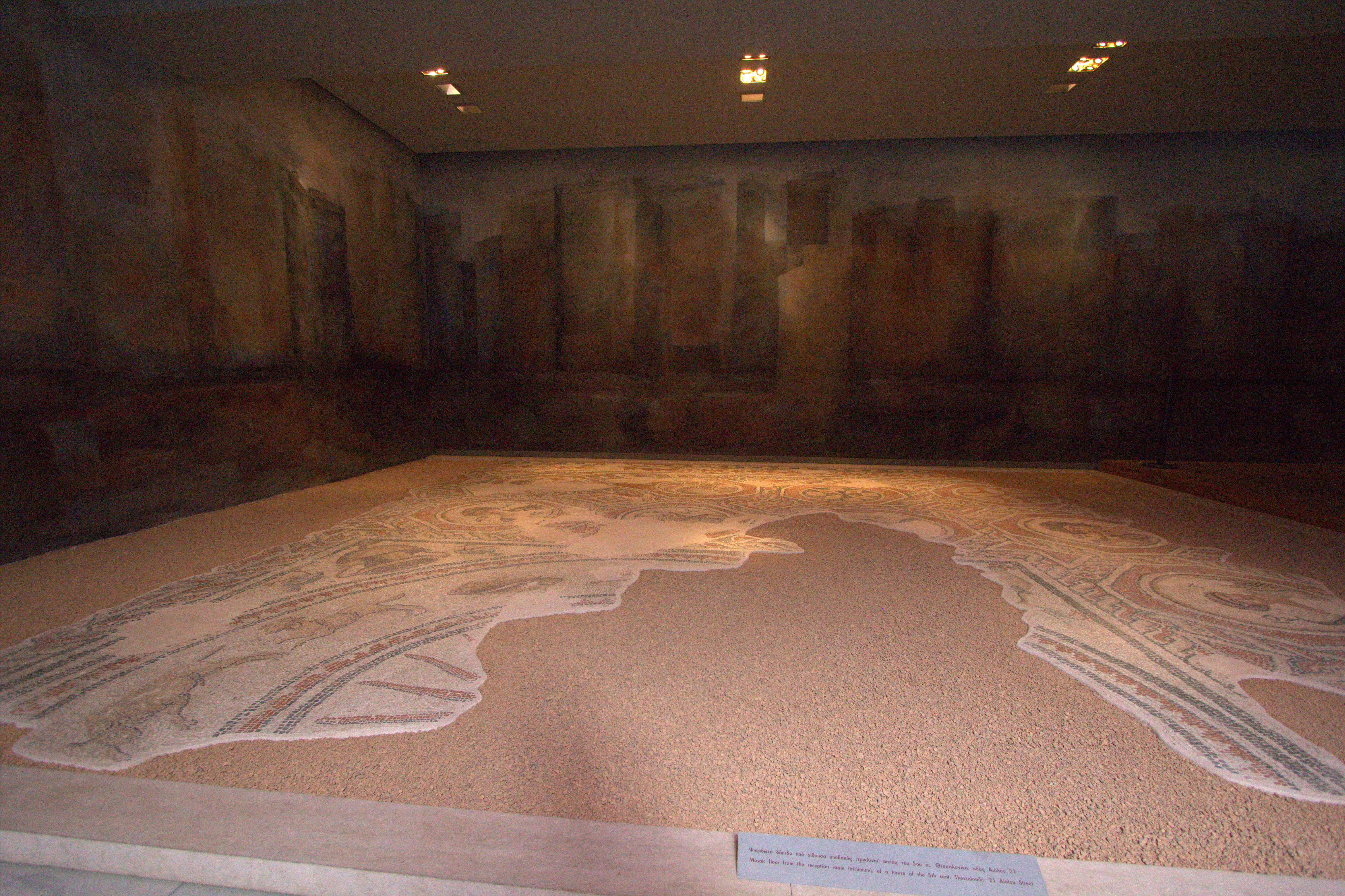 Thessaloniki, 21 Aiolou Street. Museum of Byzantine Culture, Thessaloniki, Greece. --- Ψηφιδωτό δάπεδο από αίθουσα υποδοχή (τρίκλινιο) οικίας του 5ου αι. Θεσσαλονί, οδός Αιόλου 21. Μουσείο Βυζαντινού Πολιτισμού, Θεσσαλονίκη.